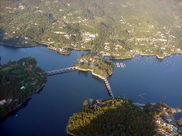 Foto aérea da Albufeira da Caniçada, Freguesia de Rio Caldo - Terras de Bouro